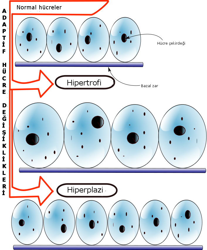 Hiperplazi-hipertrofi farkını gösteren basit bir diyagram.